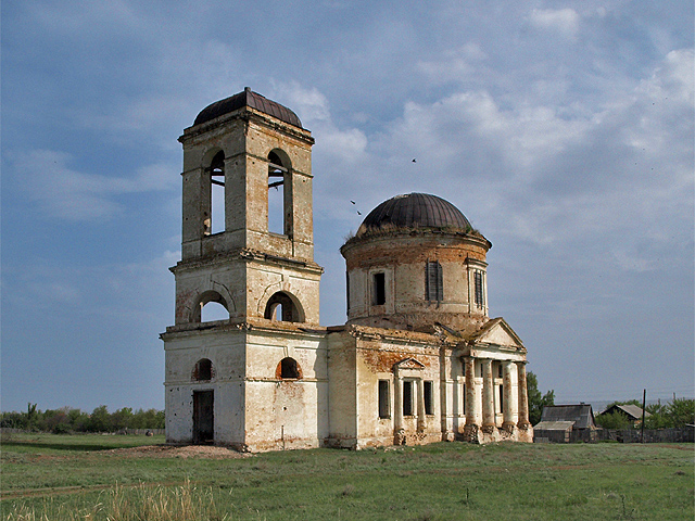 Церковь Воскресения Христова в Ахмате